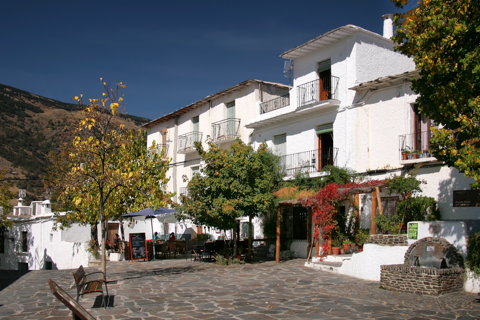 Capileira en la Alpujarra granadina.